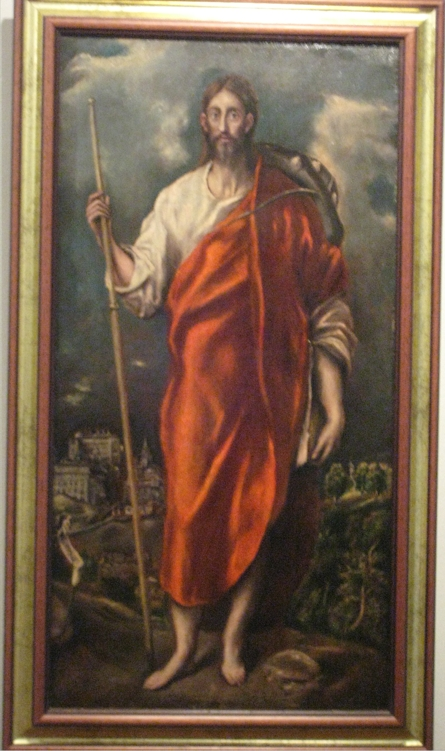 Jacob Mayor